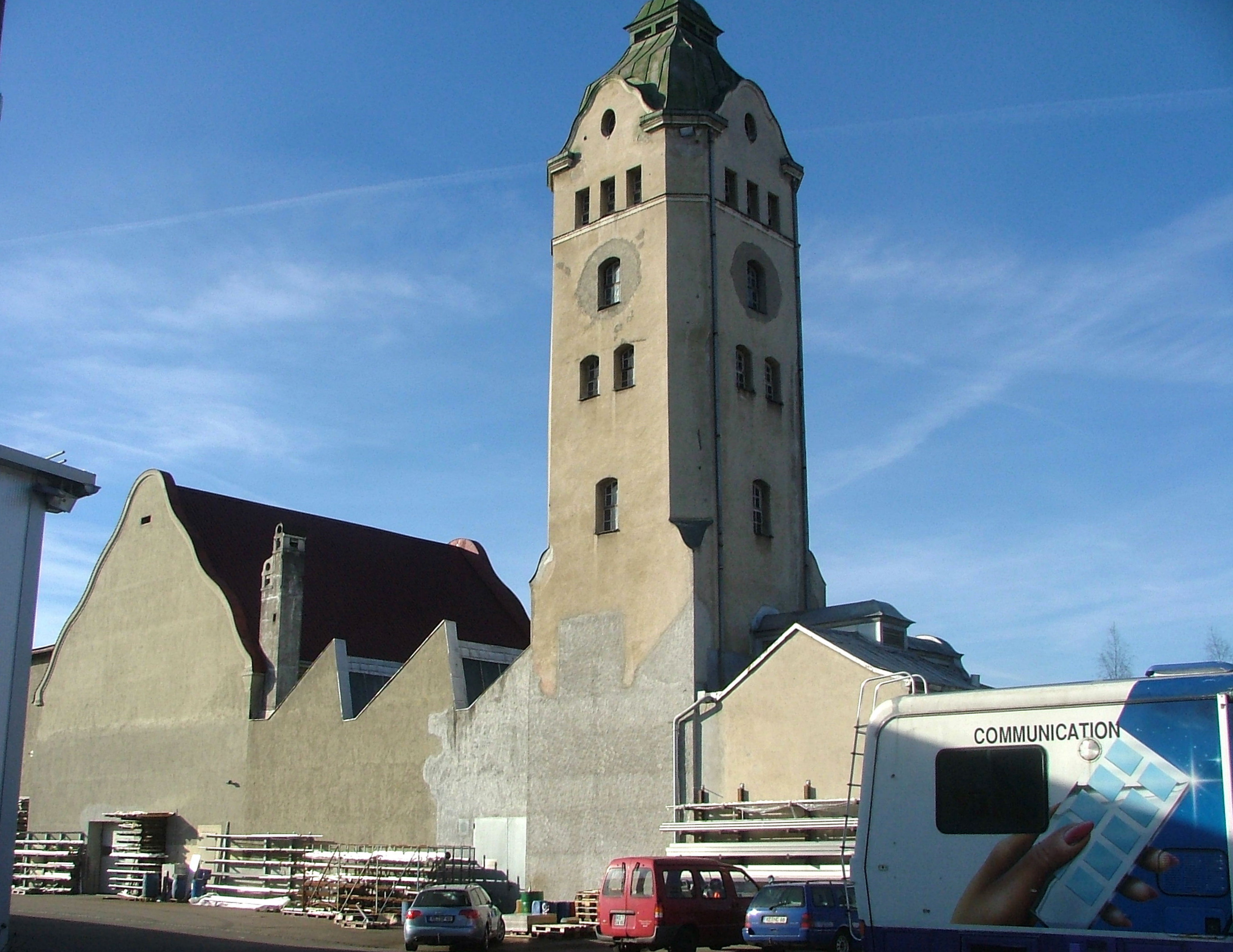 Maschinenhalle in Kempten-Kottern bei Durach.